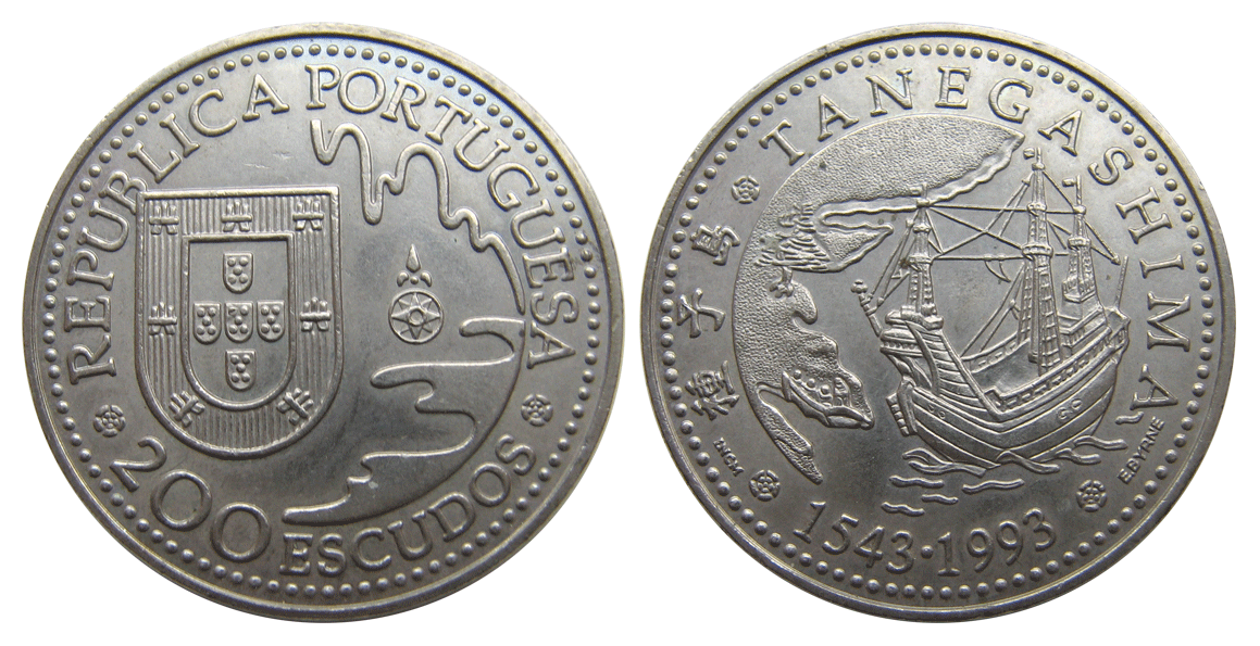 200 escudos 1543-1993 Tanegashima